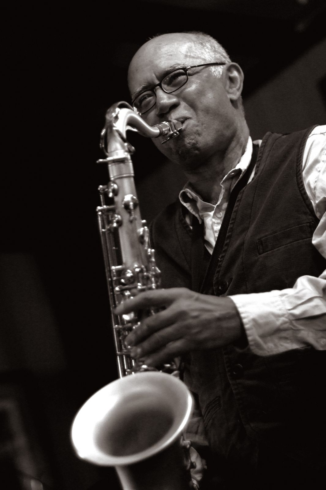 Art Themen